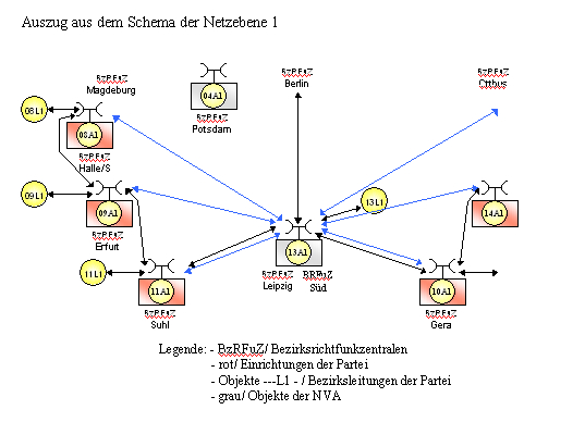 Auszug aus der Netzebene 1 des Richtfunknetzes der Partei und der NVA